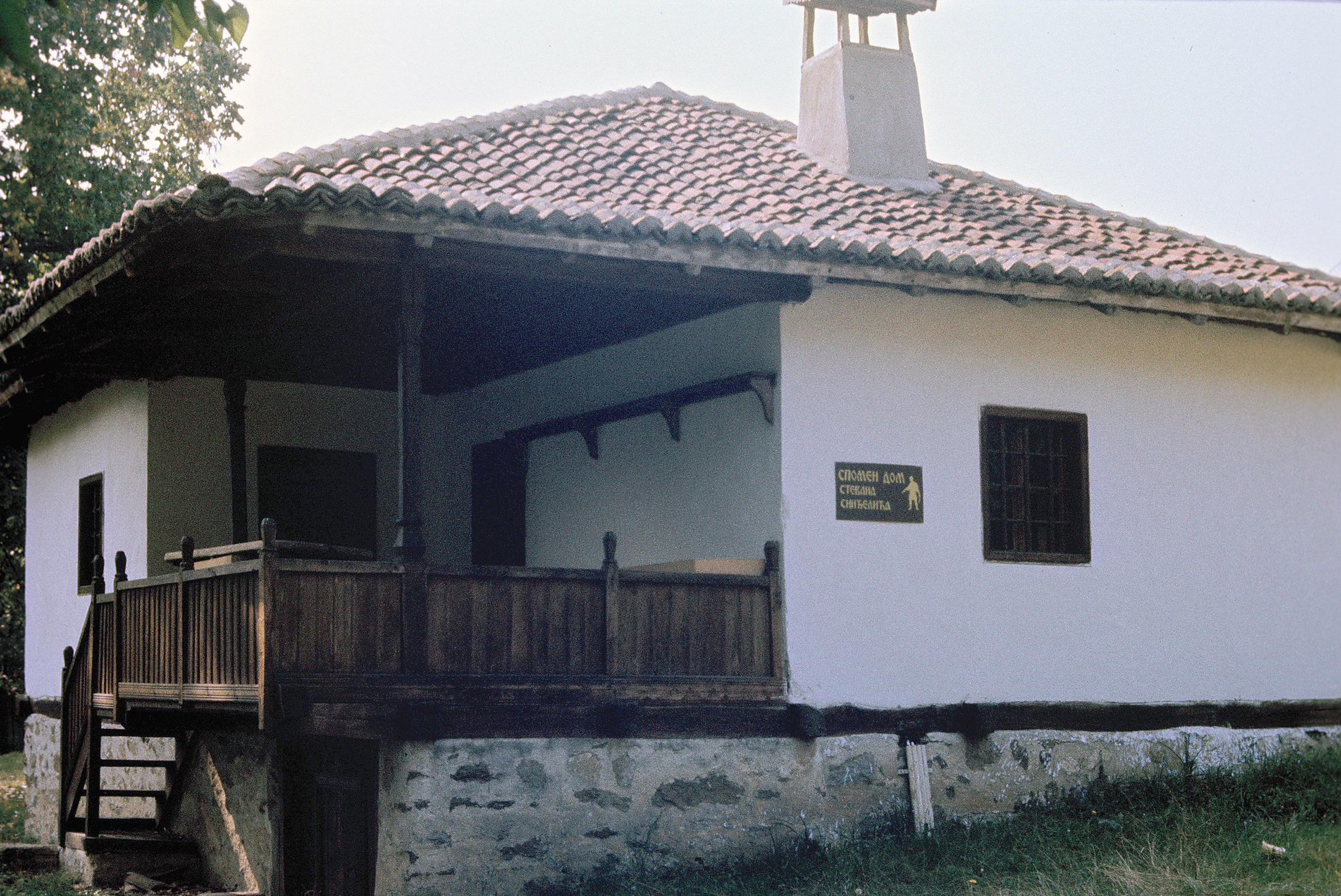 Kuća Stevana Sinđelica selo Grabovac Svilajnac